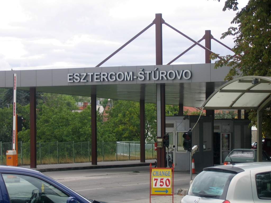 Autor: Ervín Pospíšil